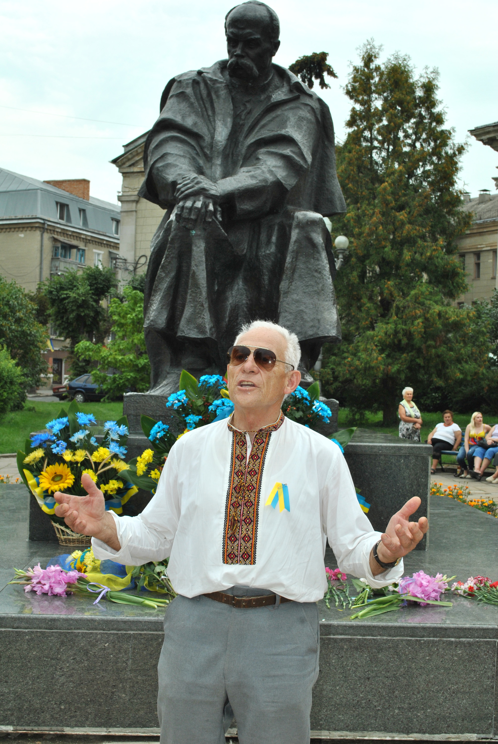 Вірш Тараса Шевченка біля його пам'ятника в Тернополі читає український громадсько-політичний діяч, старший науковий працівник історико-меморіального музею політичних в'язнів Ігор Олещук.